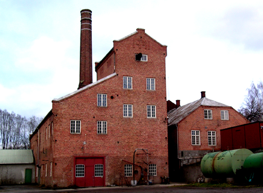 Stange (Atlungstad) brenneri, Stange, Norway.